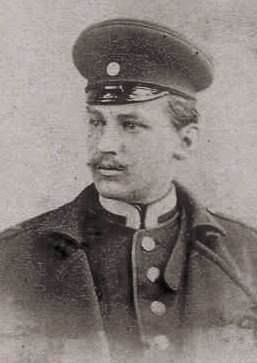 Ludwig Meyländer gen. Rogalla von Bieberstein (1873-1940), um 1900